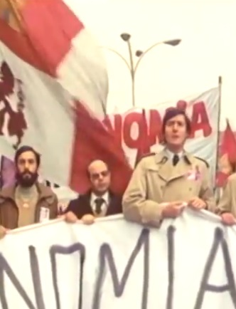 Manifestación en 1978 en la que se demandaba el Estatuto de Autonomía para Castilla y León.